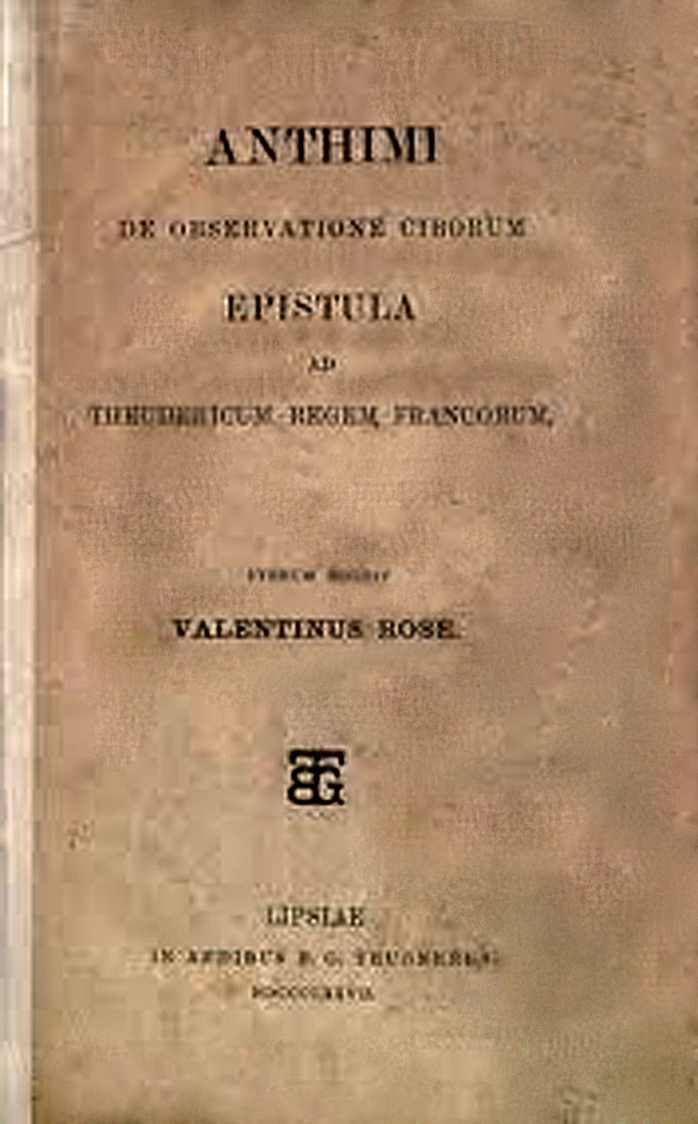 Anthimus Lettre à Thierry 1er